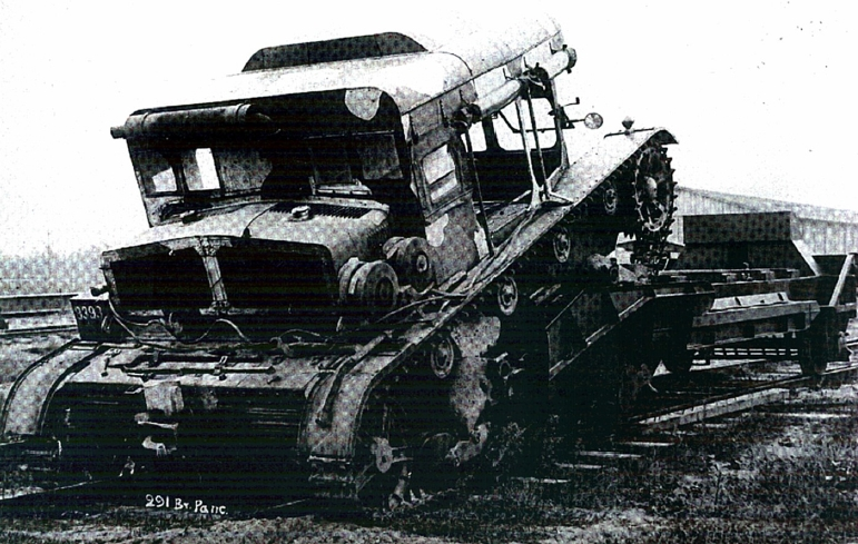 "Felek" podczas prób jazd na prototypie prowadnicy szynowej z 1937 roku. Pojazd jeszcze z numerem 8393 (namalowanym na tylnej ściance lewej skrzynki narzędziowej) oraz w kamuflażu stosowanym w latach 1931-1937. [opis oryginalny]